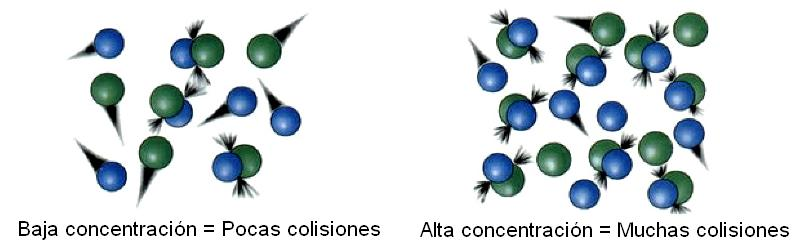 Ilustración de la dependencia de la frecuencia de colisiones moleculares con la concentración